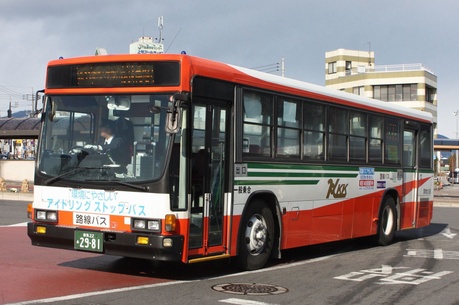 関越交通渋川営業所 車番:2981 渋川駅にて